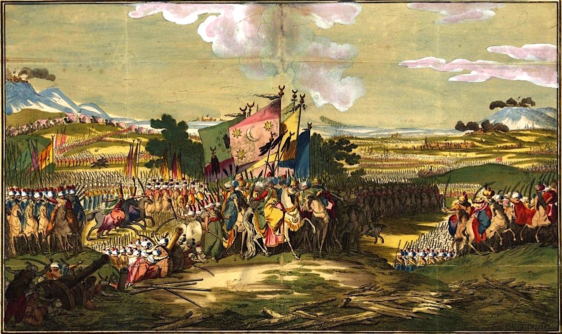 "Vorstellung der Türkischen Haupt Armee mit 80 000 Mann in Anmarsche bei Sophia in Bulgarien 1788, in Monat Maÿ."